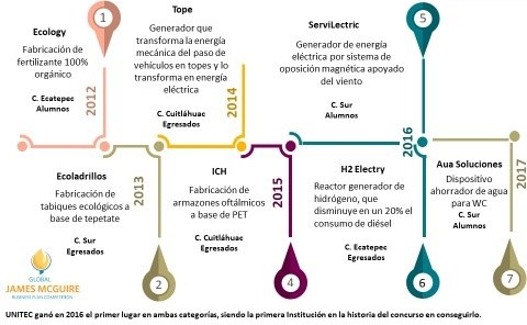 Breve línea del tiempo en la que se muestran los proyectos destacados que se han formado en la Incubadora de Empresas de la UNITEC.